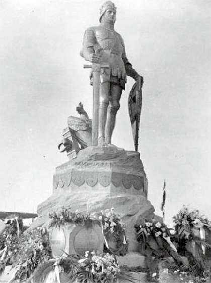 天津罗兰雕像，为纪念八国联军德军阵亡士兵而建